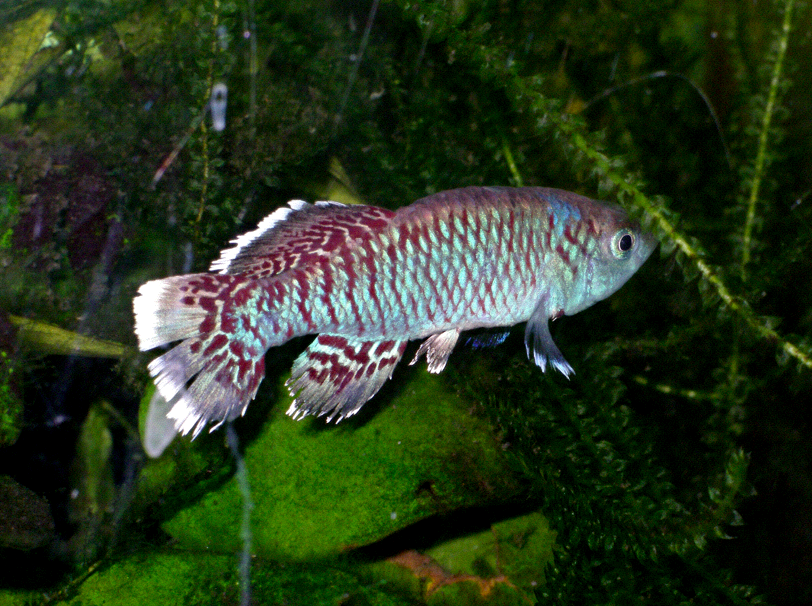 Nothobranchius eggersi (male)